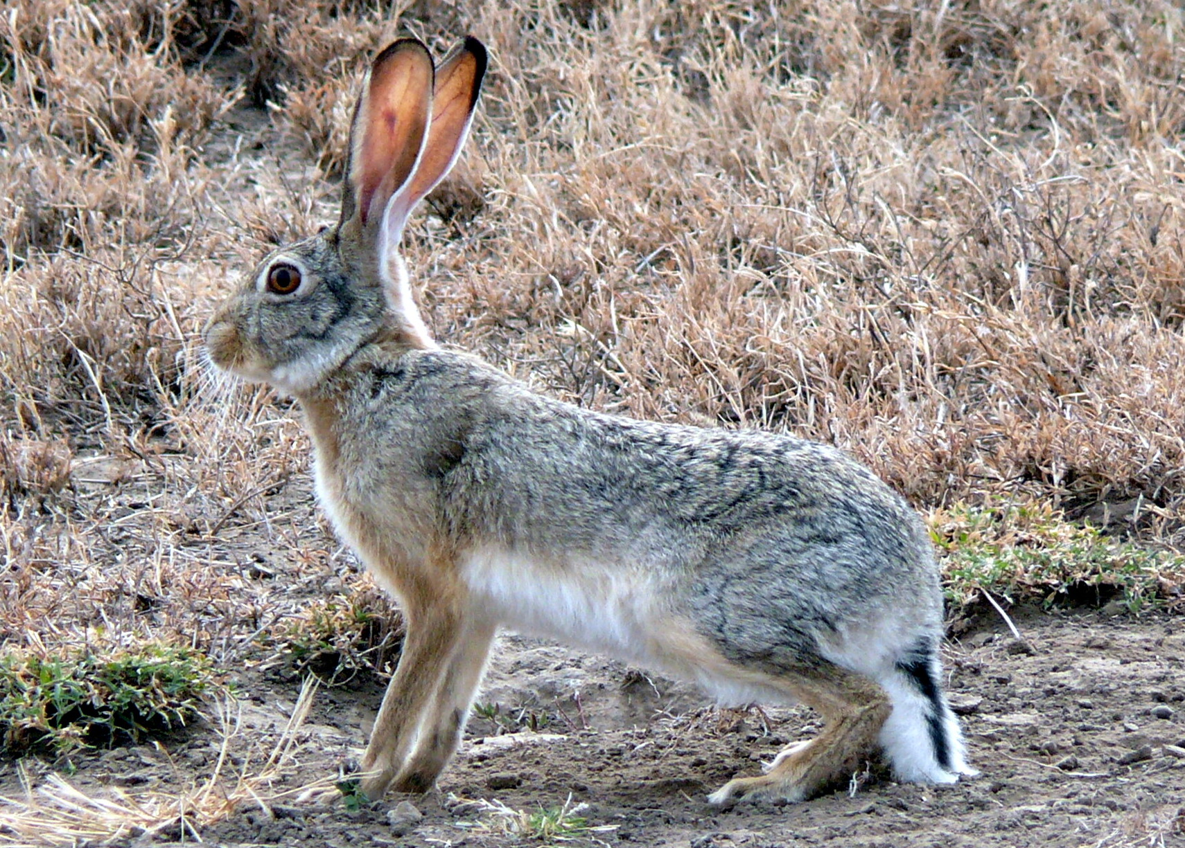 Kaphase (Lepus capensis), Nord-Tansania